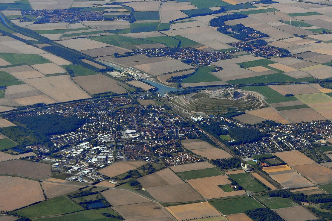 Flug von Hannover nach Rom 2013